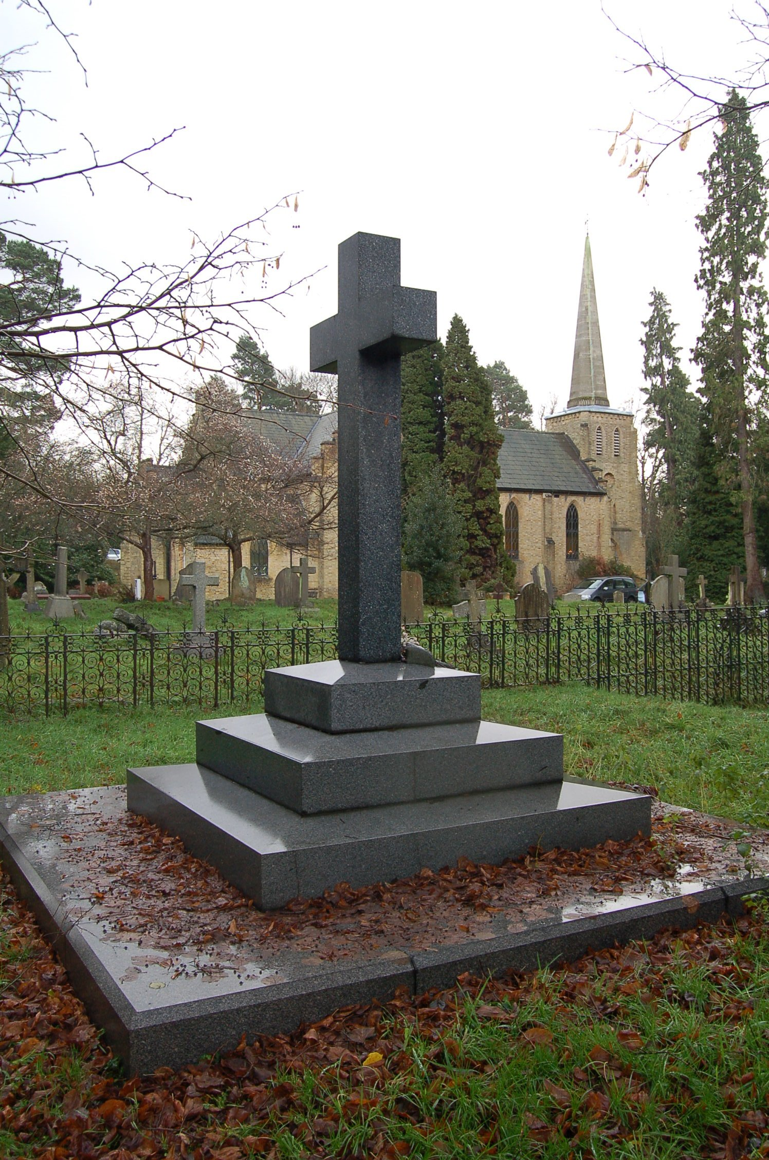 Tumba del General Ramon Cabrera